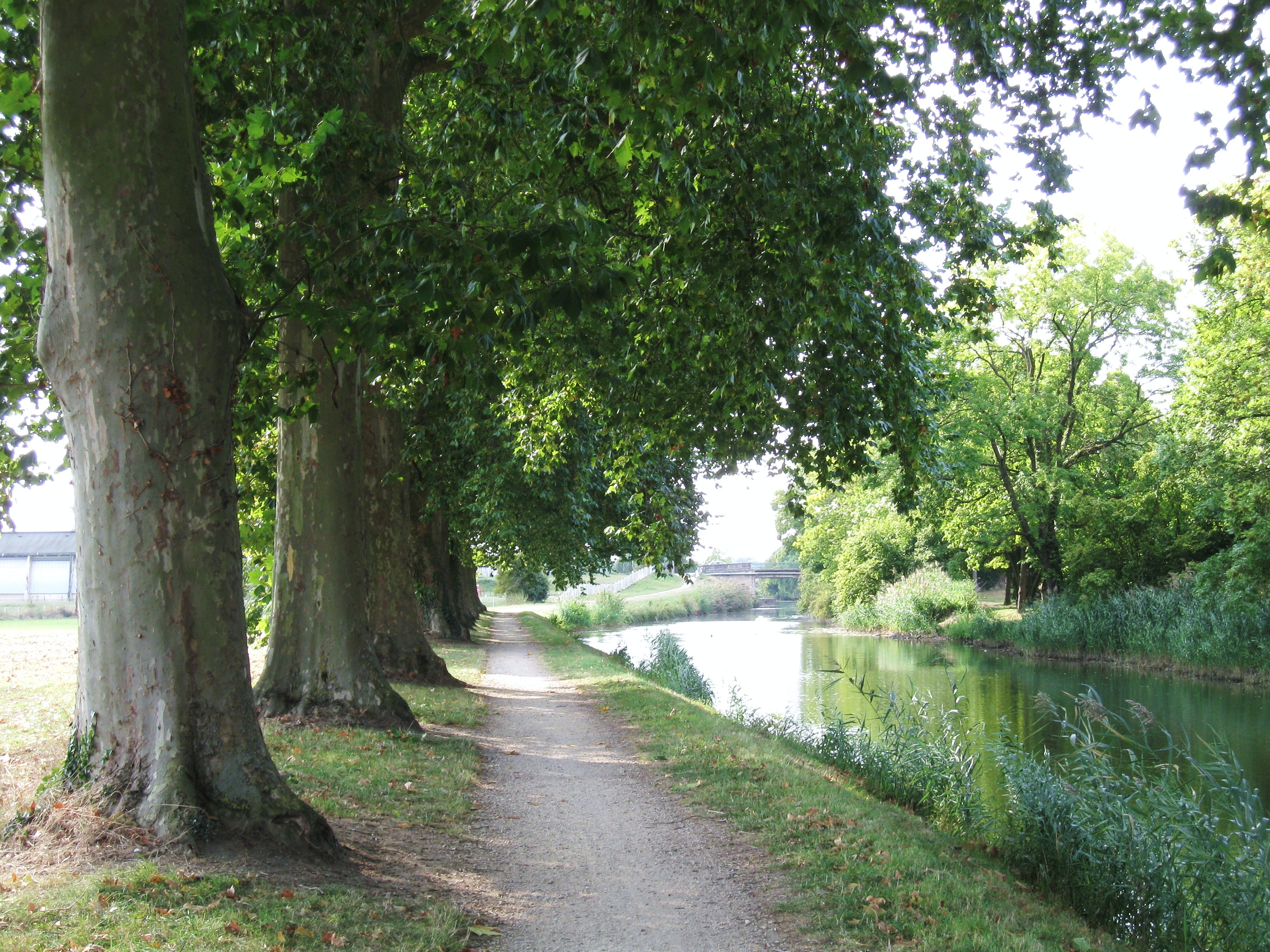 Canal d'Orléans, Chécy, Loiret, France